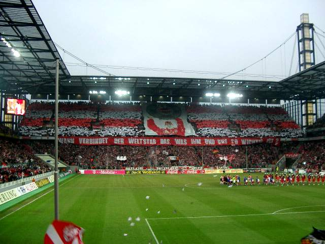 Choreographie der Wilden Horde, Ultrà-Gruppierung des 1. FC Köln.